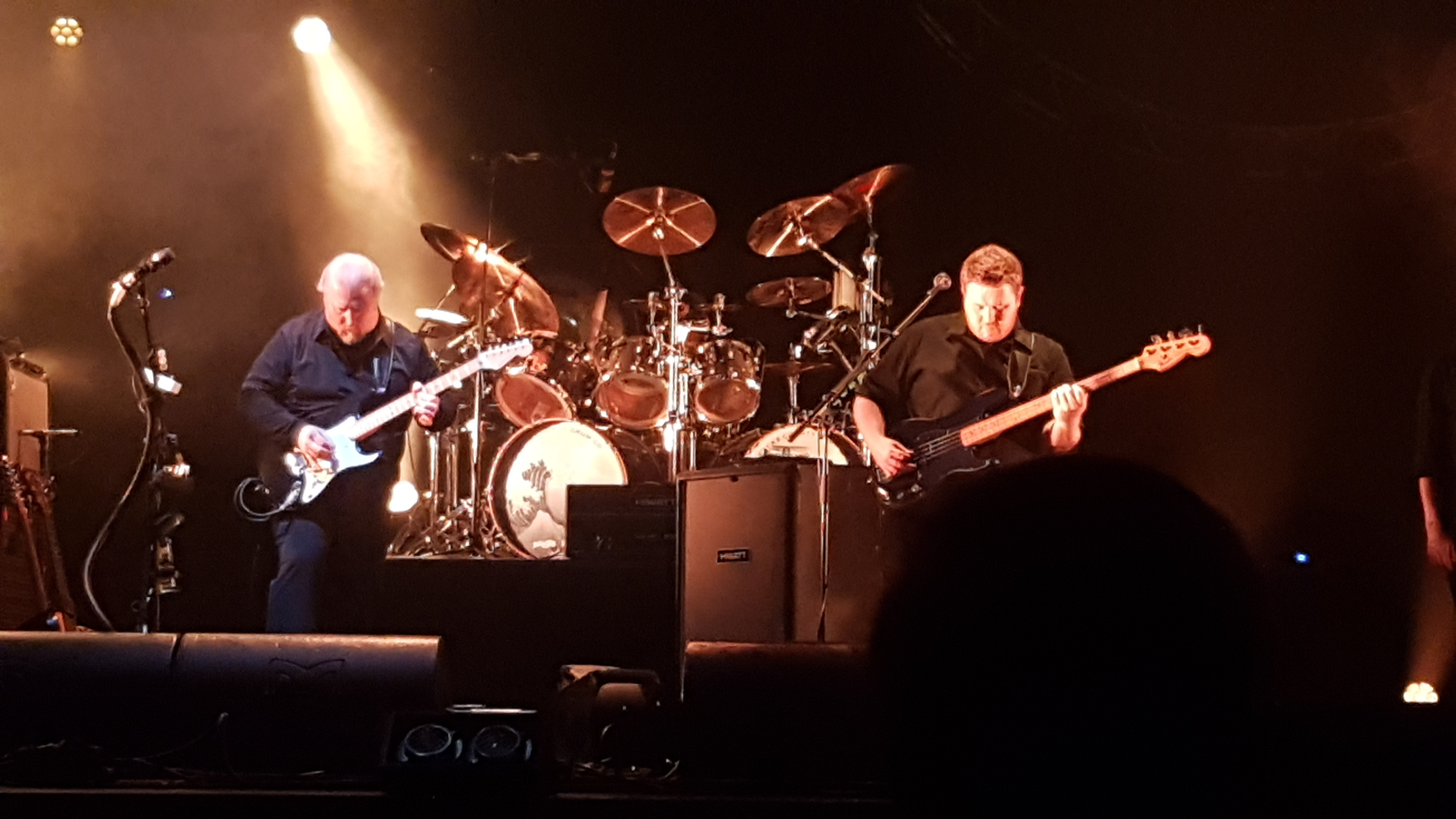 The Australian Pink Floyd Show à la Seine musicale, le 14 avril 2019, All That You Love tour.